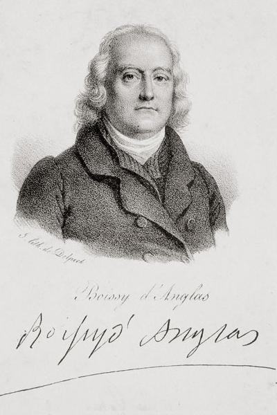 Der französische Revolutionär François-Antoine Boissy d’Anglas (1756-1826)